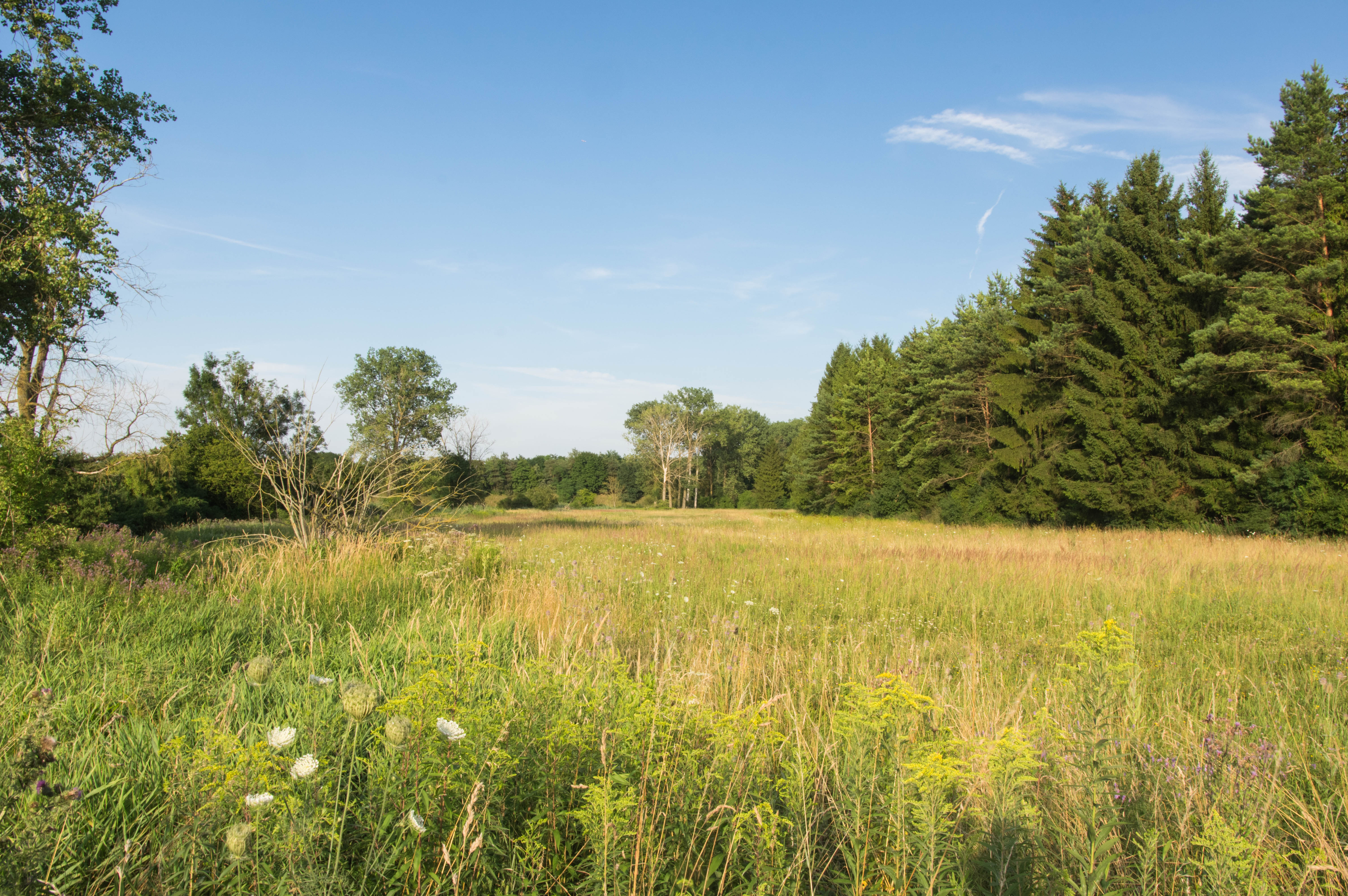 Teilansicht von Westen am Beginn des Landschaftsschutzgebietes, LSG LSG-00366.01